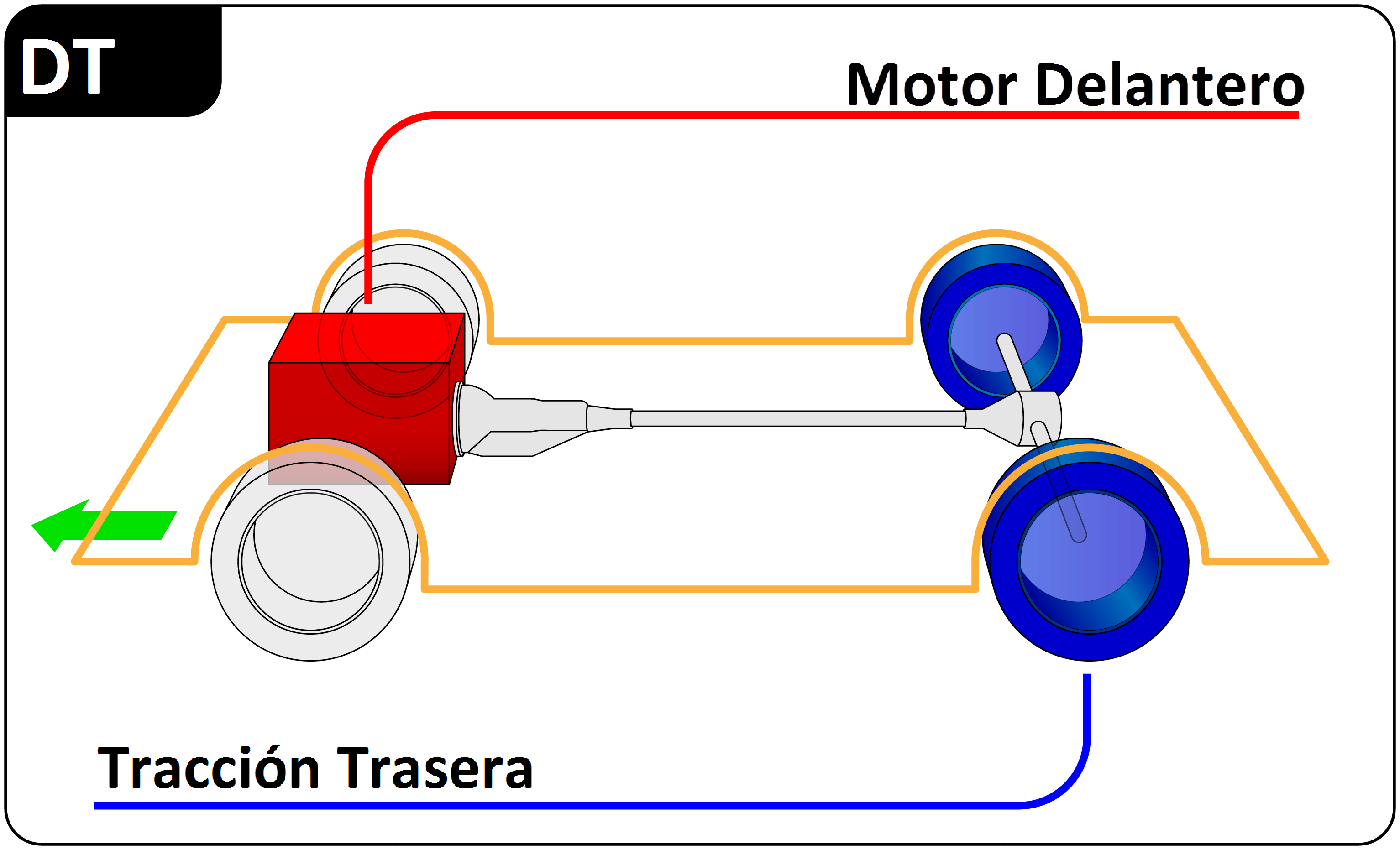 Diagrama de un vehículo con motor delantero y tracción trasera (DT)